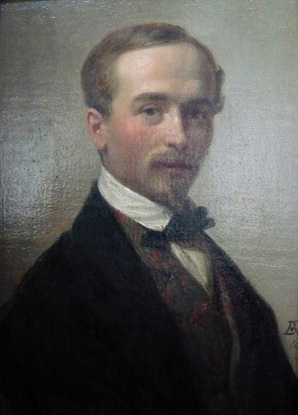 4 Randow - Porträt vermutl. Adolf von Randow (1828–1911) - in Freundschaftsgalerie von Einzelbildnissen der Düsseldorfer Malerschüler und ihren Freunden (Vermächtnis des Künstlers)